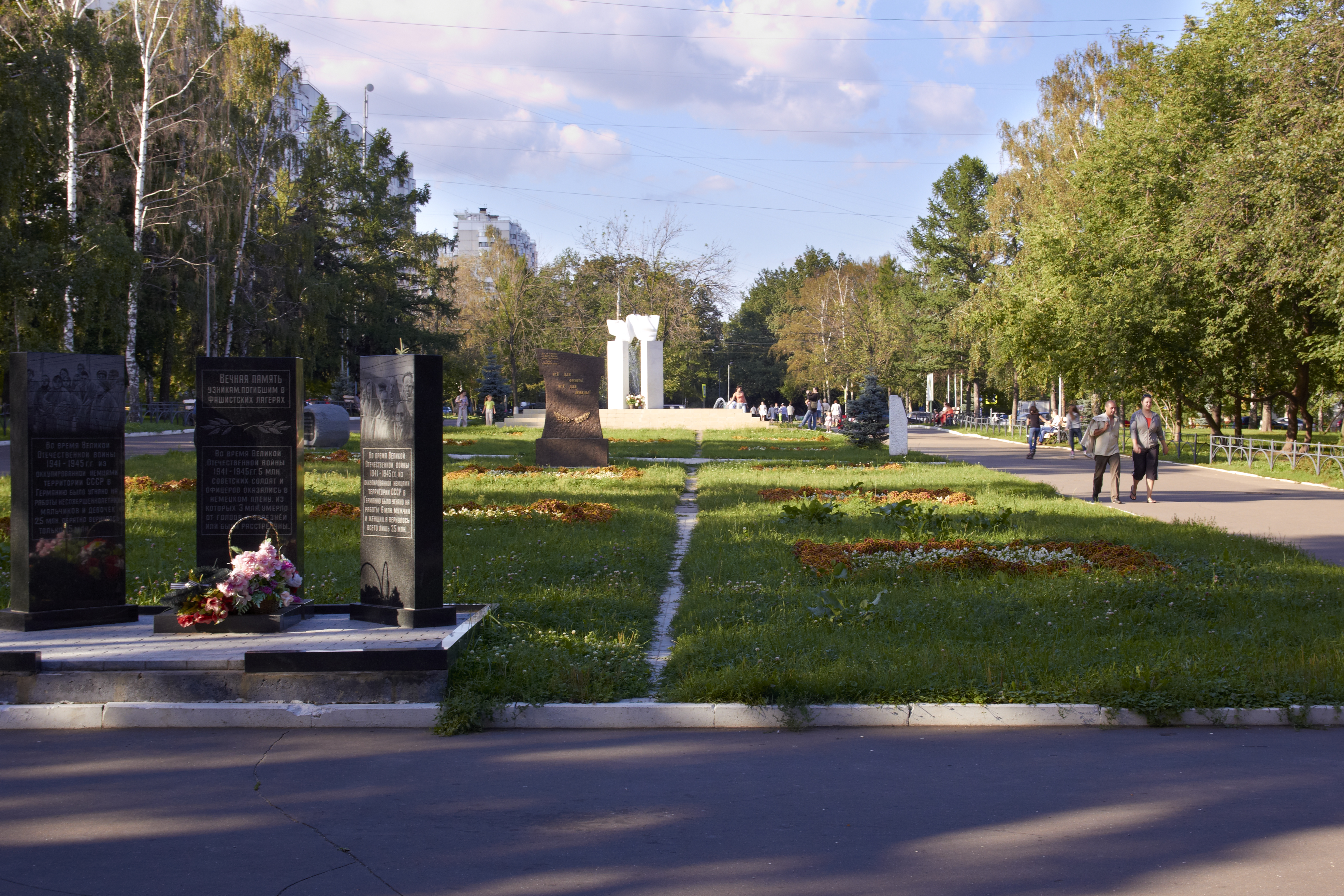 Памятники на улице Юных Ленинцев перед входом в Кузьминский лесопарк